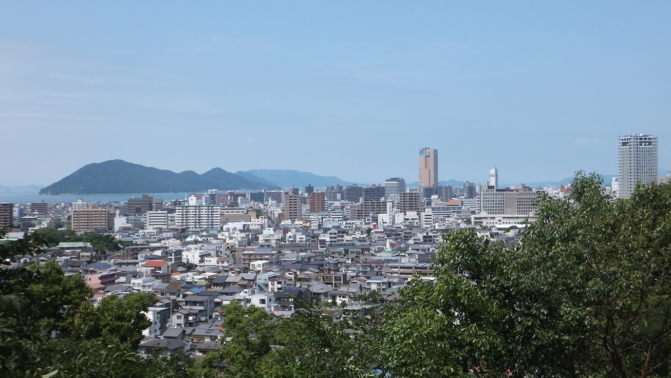 香川県高松市宮脇町２丁目の百舌坂（香川県道１７２号）から見た高松市街